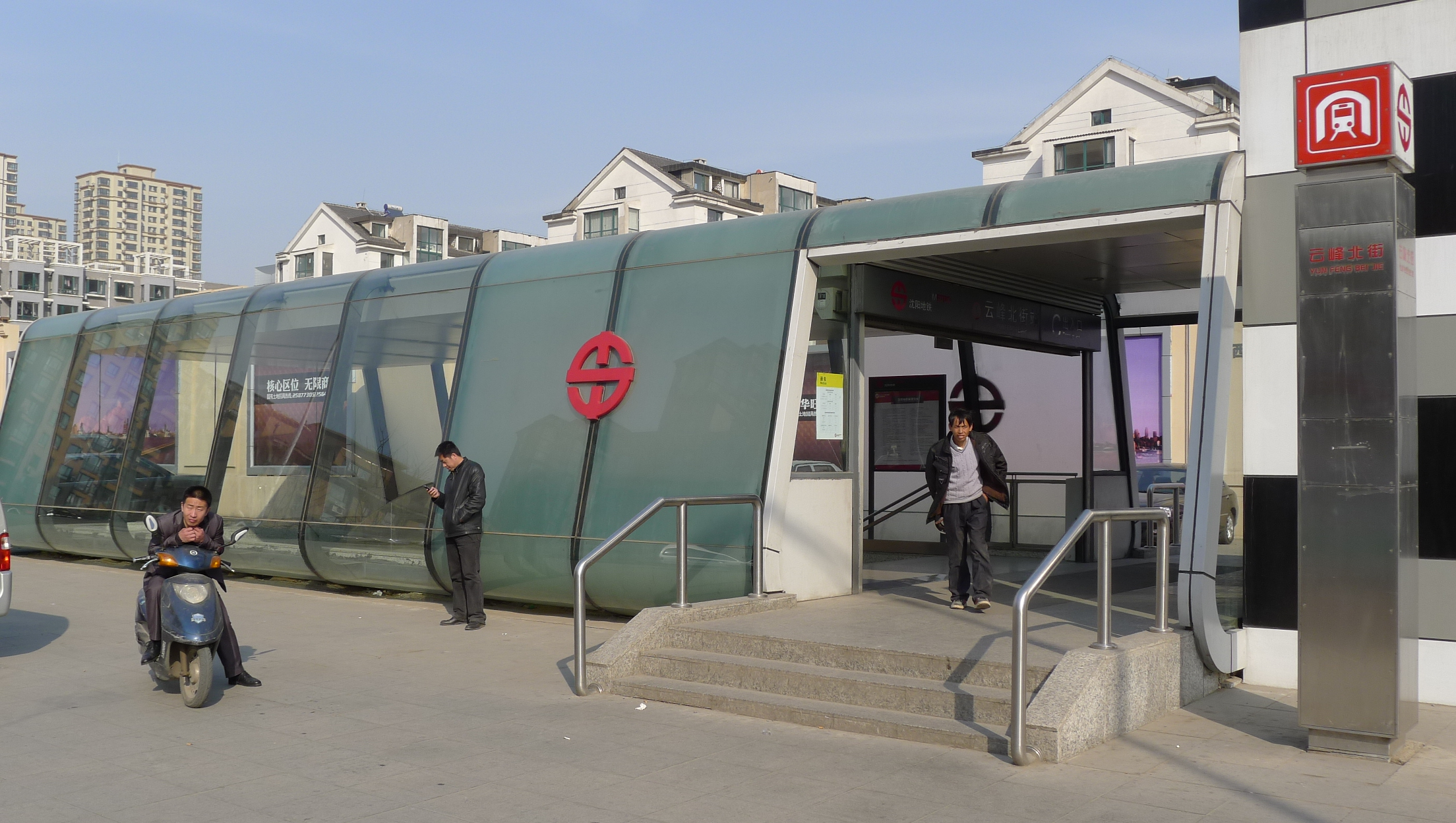 沈阳地铁一号线云峰北街站C出入口